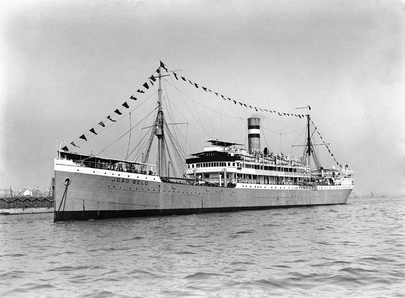 Die ehemalige WINDHUK der Hapag als portugiesische João Belo